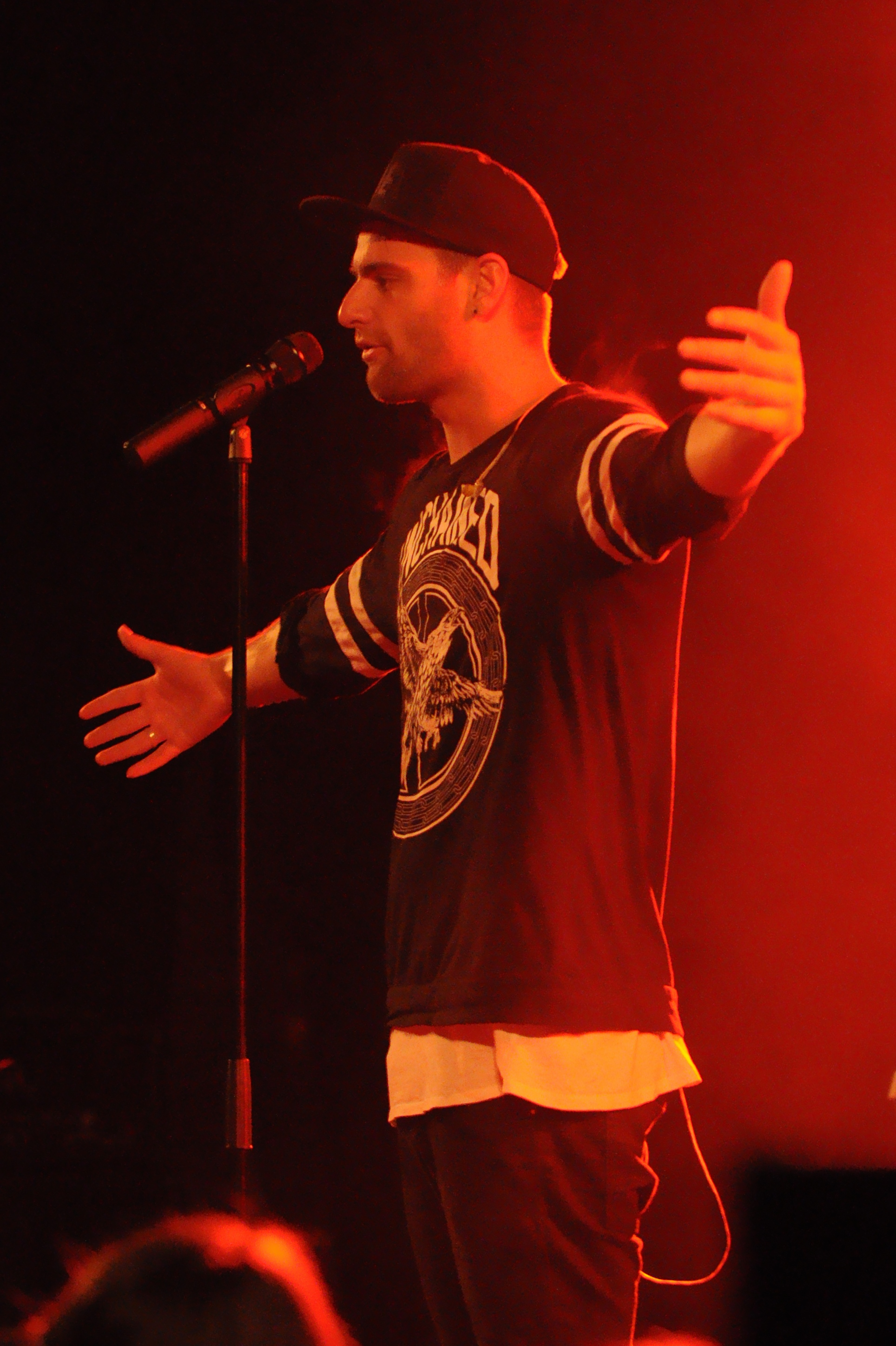 Good Weather Forecast bei Rock The North 2013 in Großefehn.